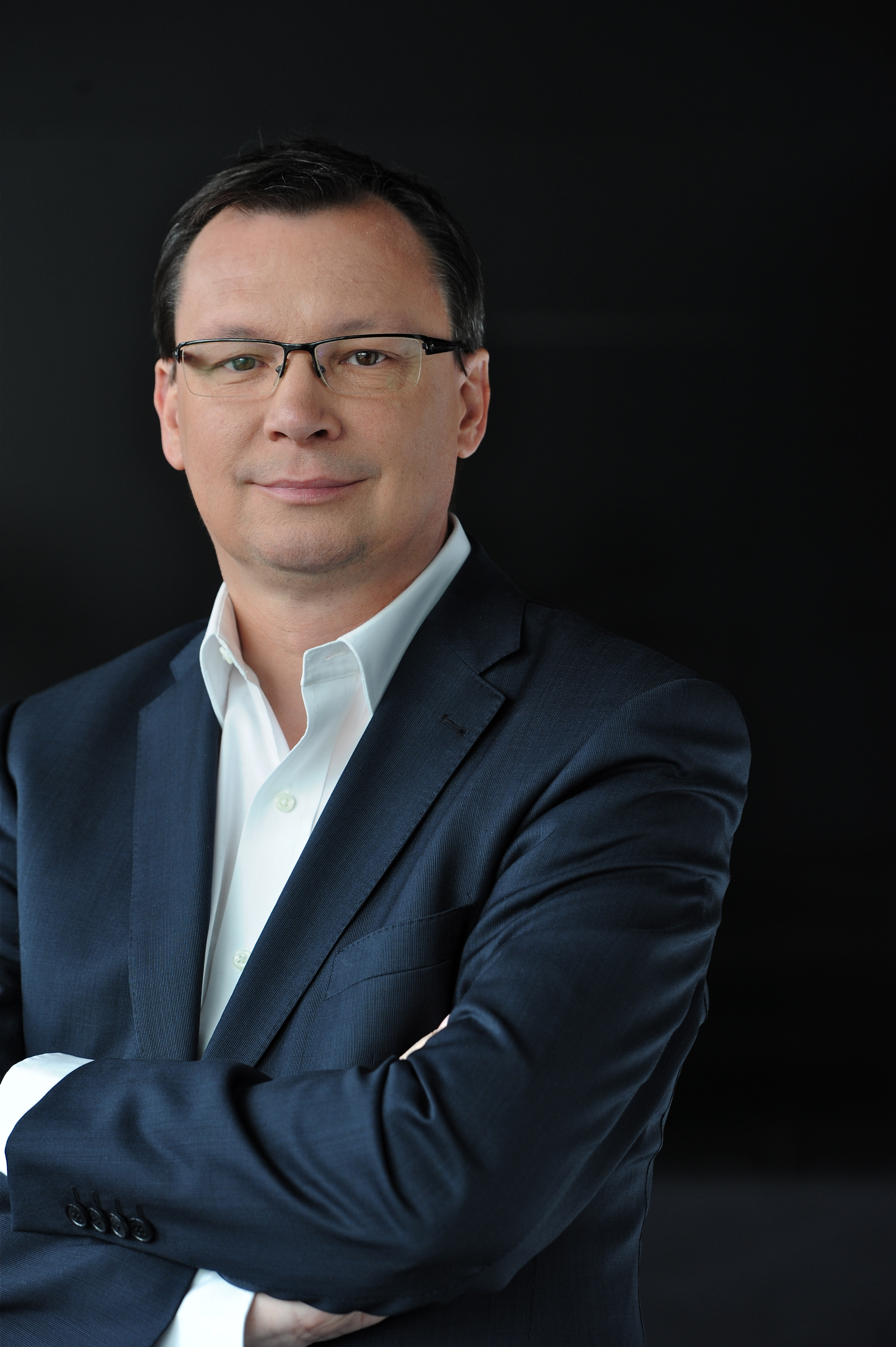 Foto: Ricardo Herrgott